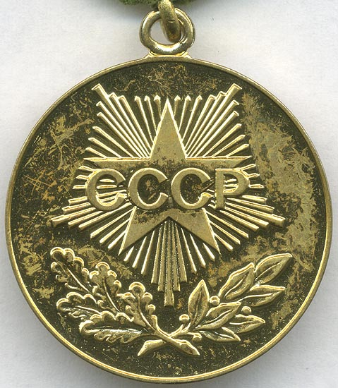 Медаль «За освоение недр и развитие нефтегазового комплекса Западной Сибири». Обратная сторона